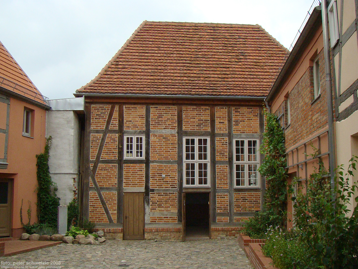 Synagoge in Röbel, Fassade zum Engelschen Hof